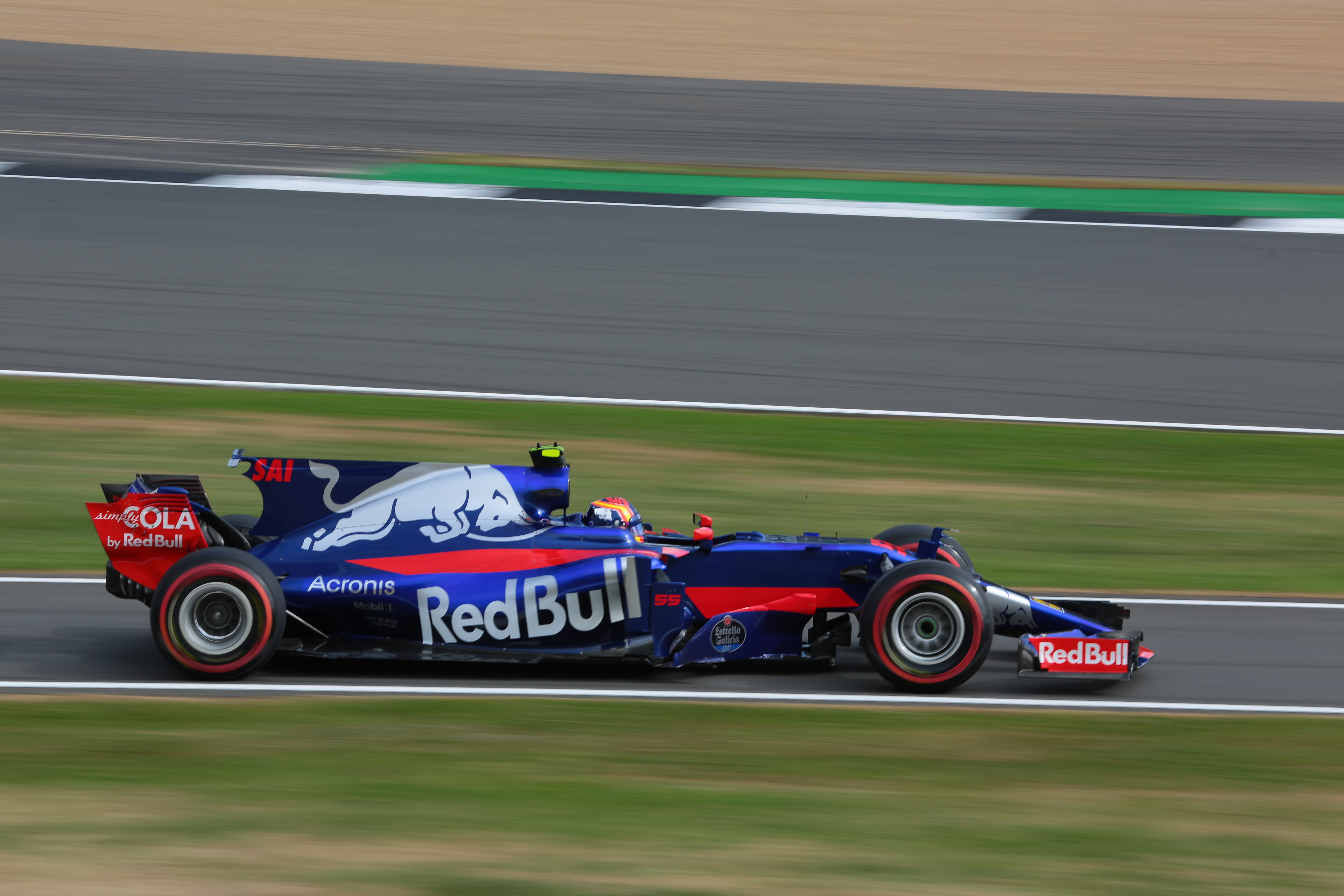 f1